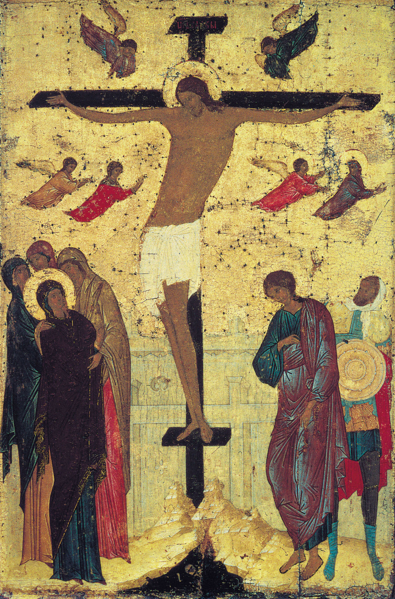 Дионисий Распятие 1500 Дерево, темпера 85 х 52